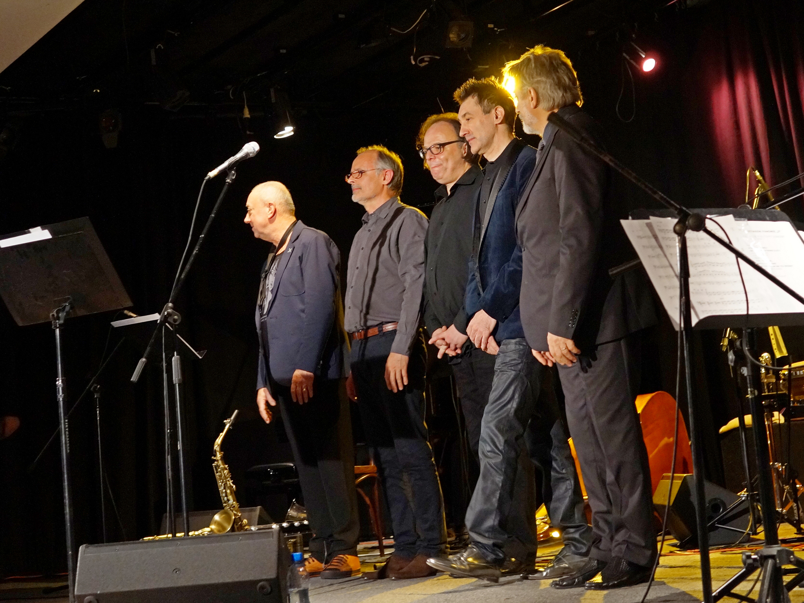 Straszni Panowie Trzej podczas koncertu ŚWIĄTECZNA ŚMIETANKA ŁOWICKA – "Straszni Panowie Trzej", Warszawa, Centrum Łowicka 27 grudnia 2014 - od lewej: Henryk Miśkiewicz, Andrzej Łukasik, Adam Lewandowski, Janusz Szrom, Andrzej Jagodziński.